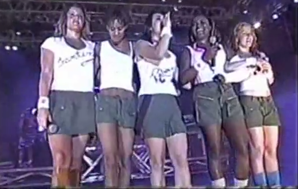 Rouge no Festival de Verão de Salvador, 2003.